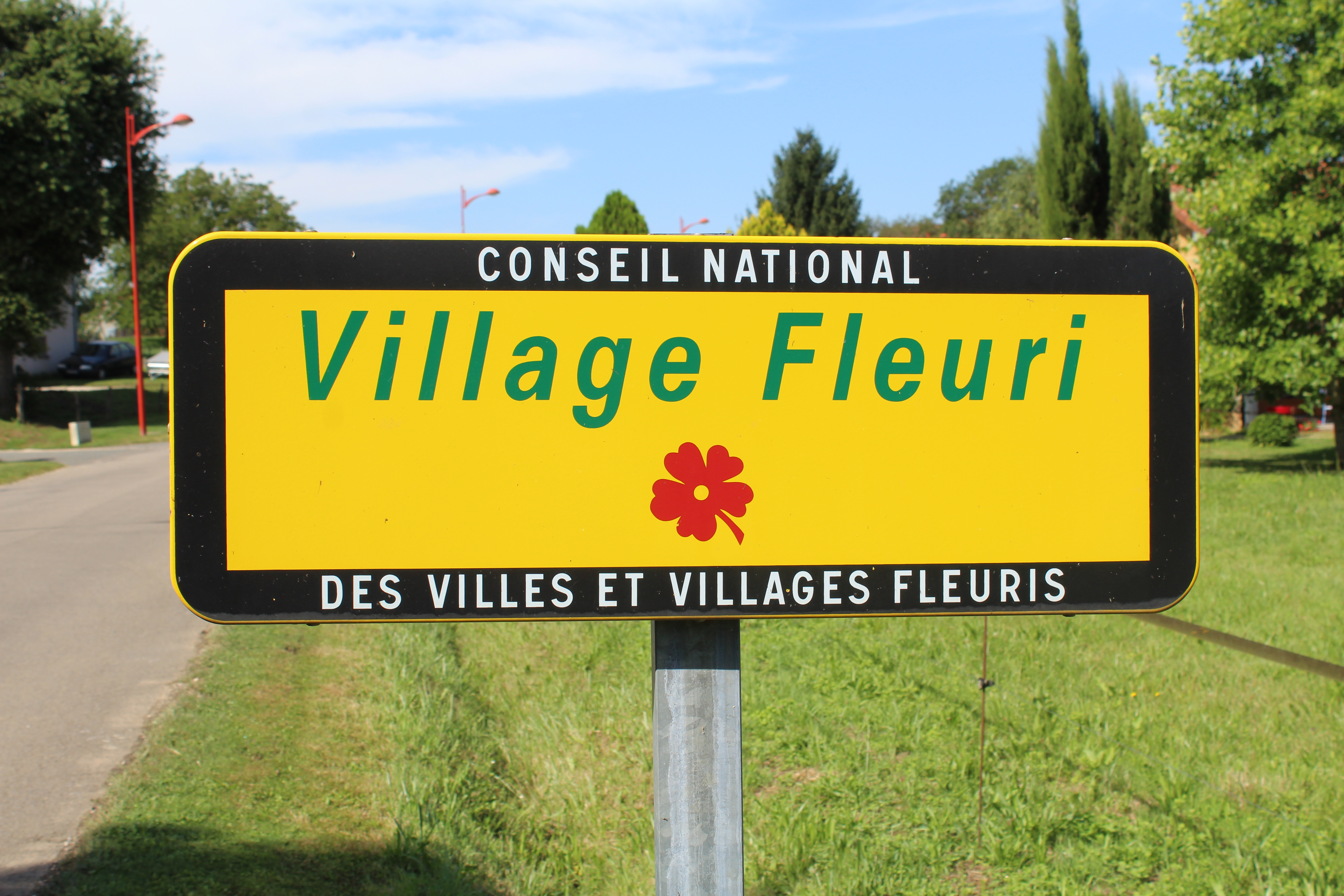 Panneau village fleuri de Saint-Julien-sur-Veyle.